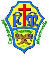 Stemma Misericordia Grassano